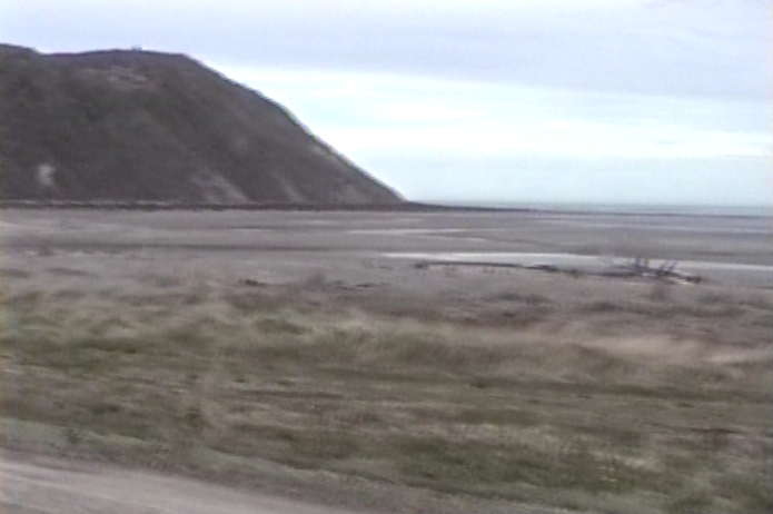 Cabo San Pablo, océano Atlántico, sector este de la isla Grande de Tierra del Fuego, en la región austral de América del Sur. Pertenece al departamento Río Grande, de la provincia de Tierra del Fuego, Antártida e Islas del Atlántico Sur en el sur de la Patagonia argentina.